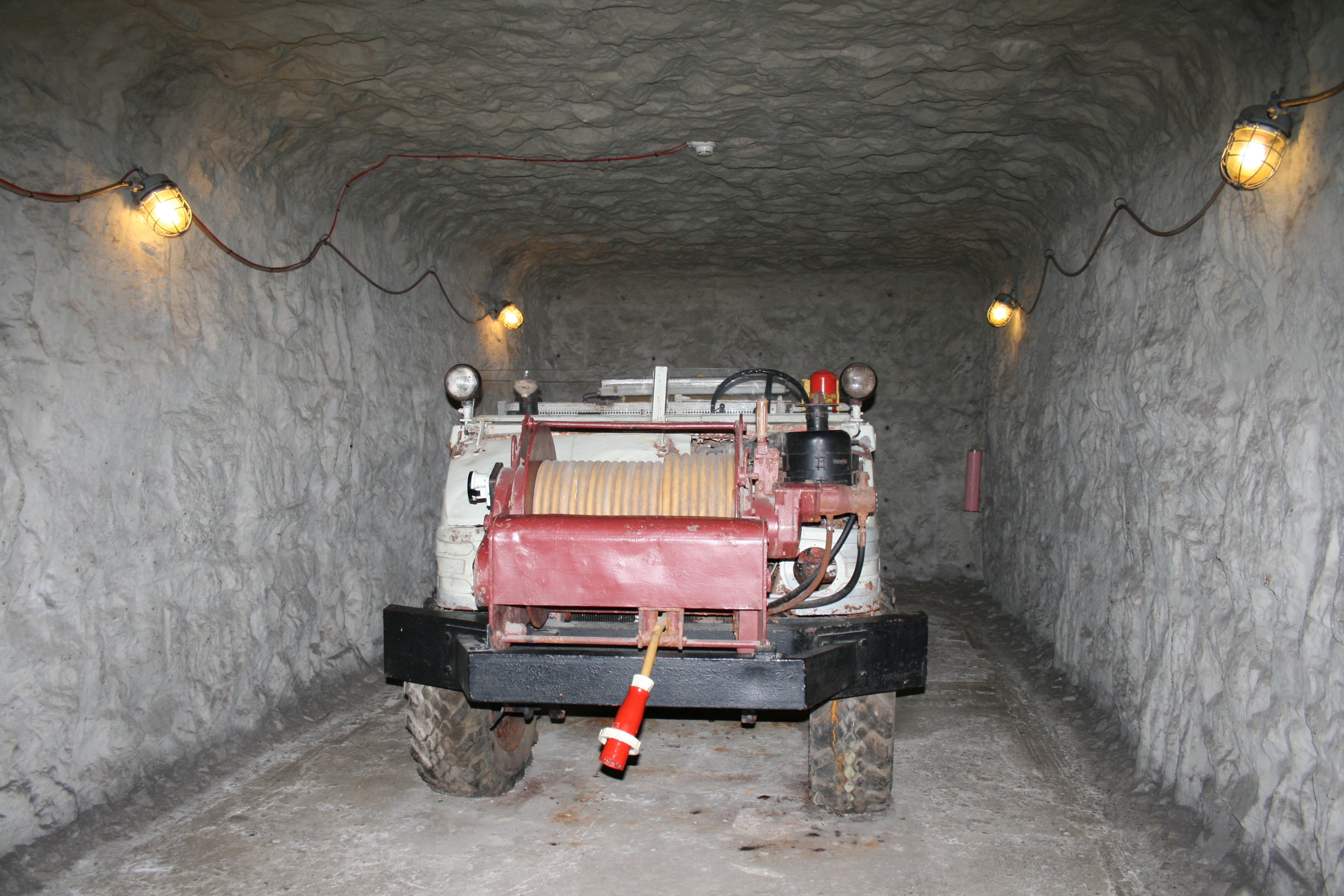 Unimog und nachgestellte Abbaukammer Bülten im Deutschen Bergbau Museum